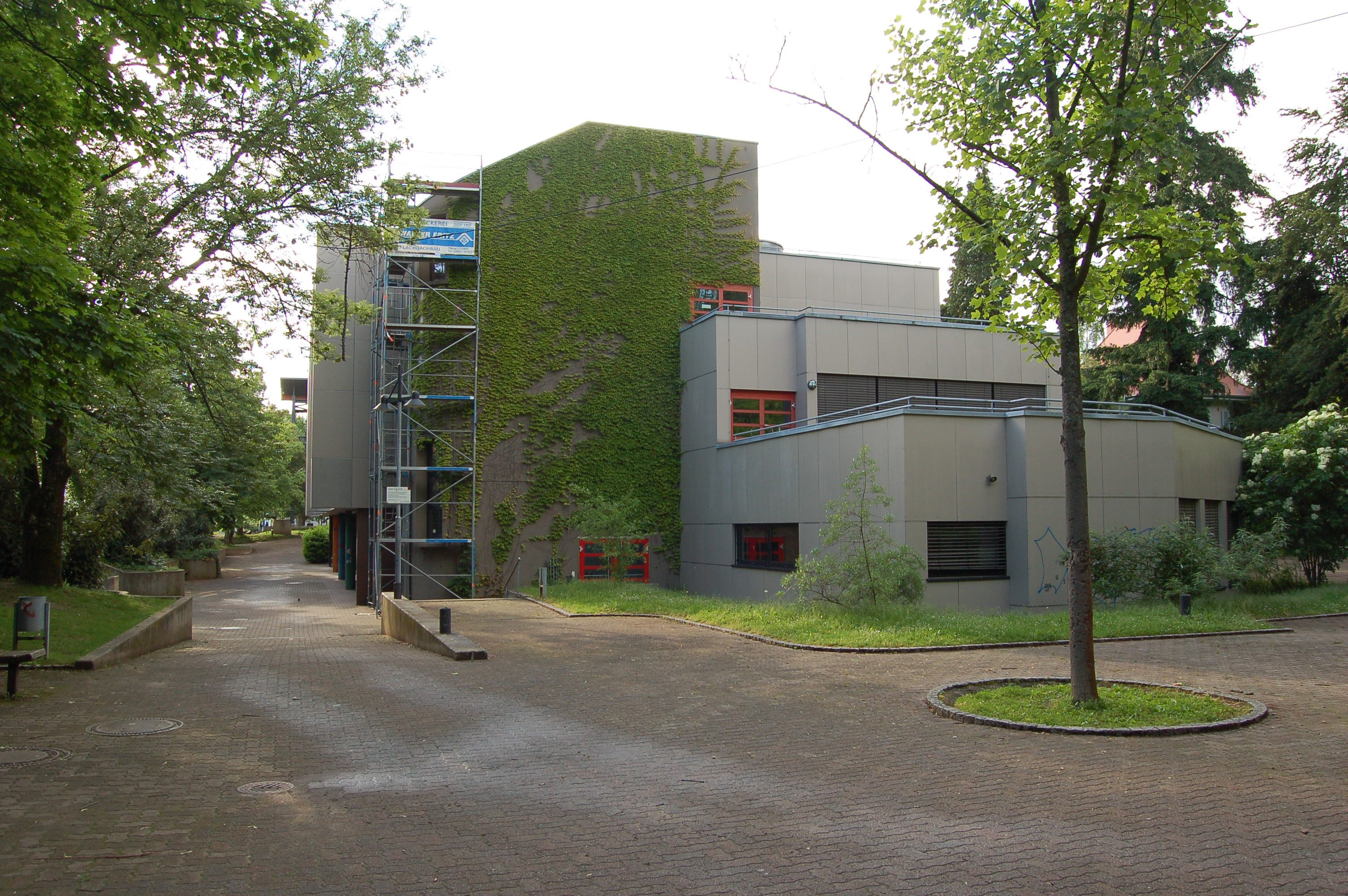 Erwyterigsböu vum Hebel-Gymnasium z Löörech